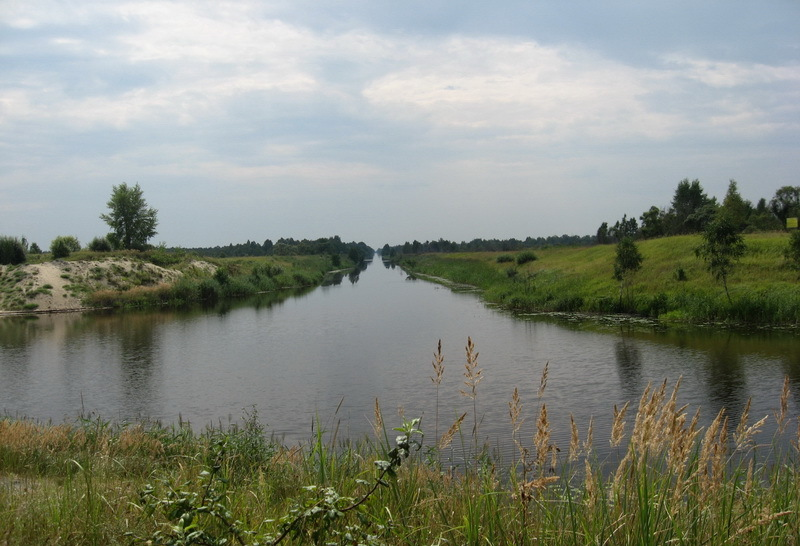 Селішча. Дняпроўска-Бугскі канал. Водападзел басейнаў рэк Дняпра і Віслы. Памятны знак устаноўлены ў 2009 годзе. Рэспубліканскім унітарным эксплуатацыйна-будаўнічым прадпрыемствам "Днепа-Бугскі водны шлях" у гонар старажытнага беларускага воднага шляху, які стагоддзямі злучае народы Усходу і Захаду